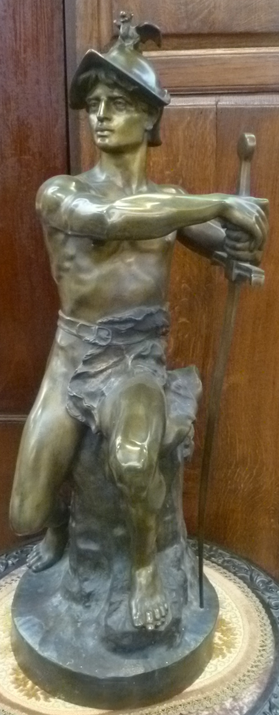 "Krijger met zwaard", bronzen beeld (hoogte: 80 cm) door de Franse beeldhouwer Marcel Debut (1865-1933); privébezit